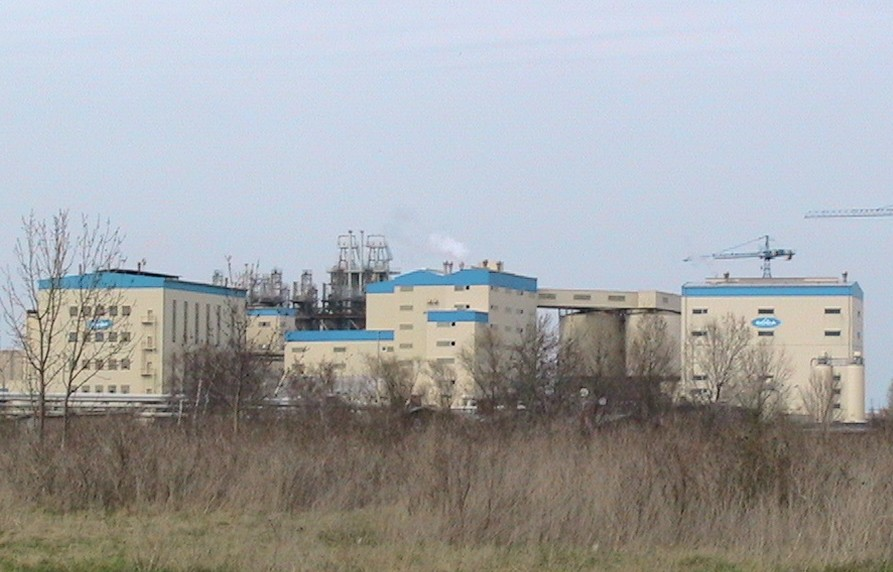 Sodawerk Staßfurt Sonstiges: Canon MVX250i (Fotofunktion) - Ausschnitt